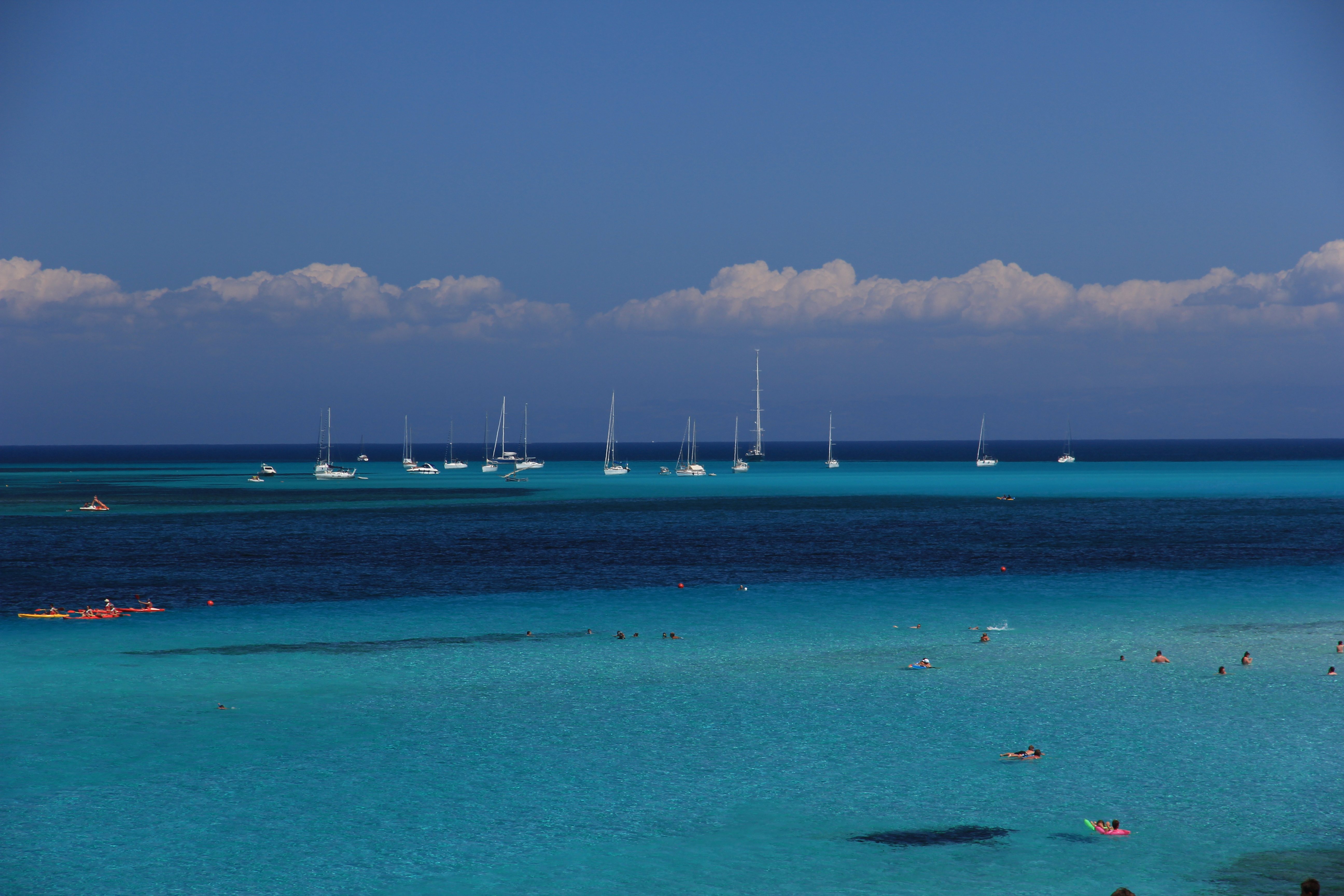 Stintino - La Pelosa